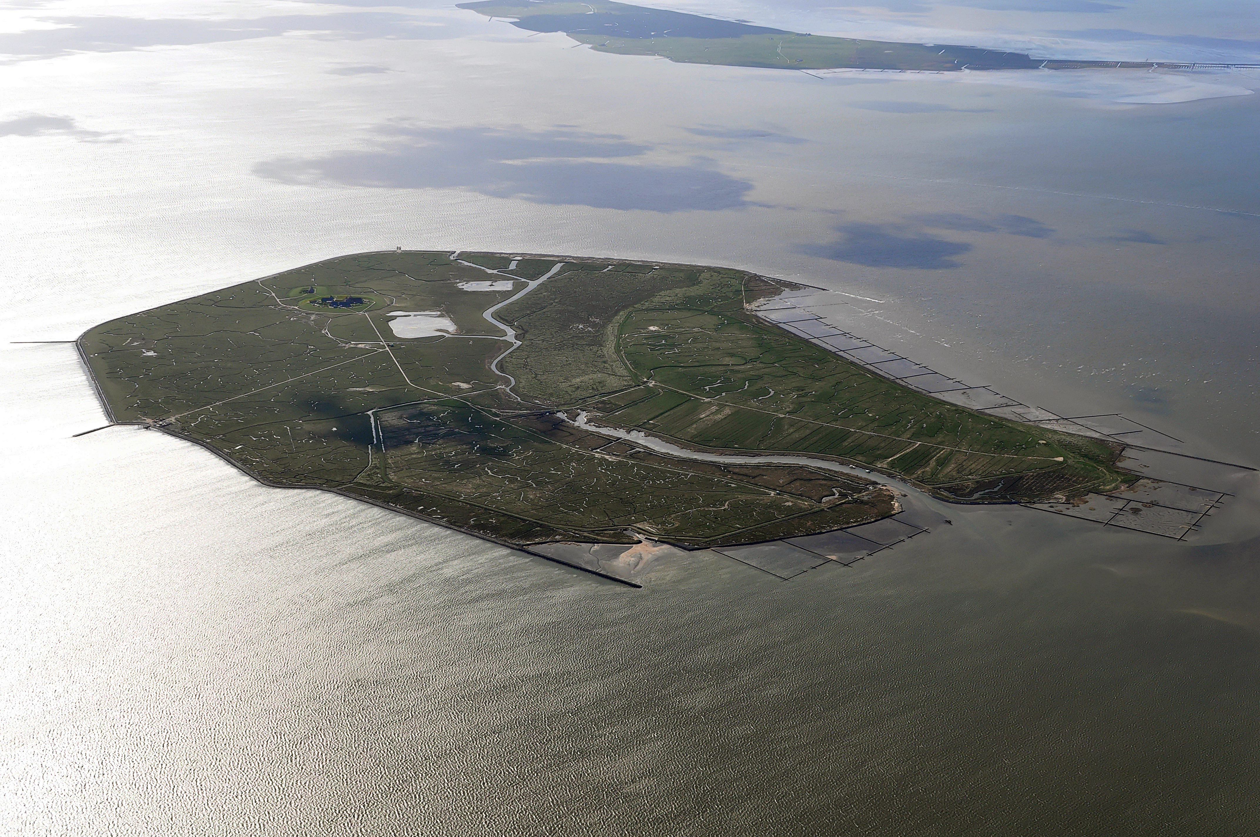 Luftbilder von der Nordseeküste 2012-05 Hallig Gröde von Osten